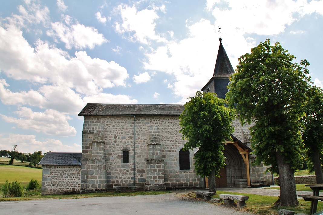 église St Martial